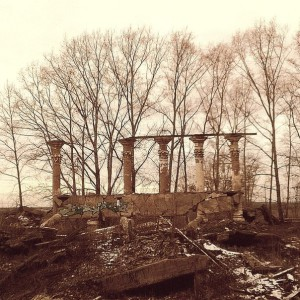 руины дома культуры "Энергетик" (Кирово-Чепецк, ул. Парковая)